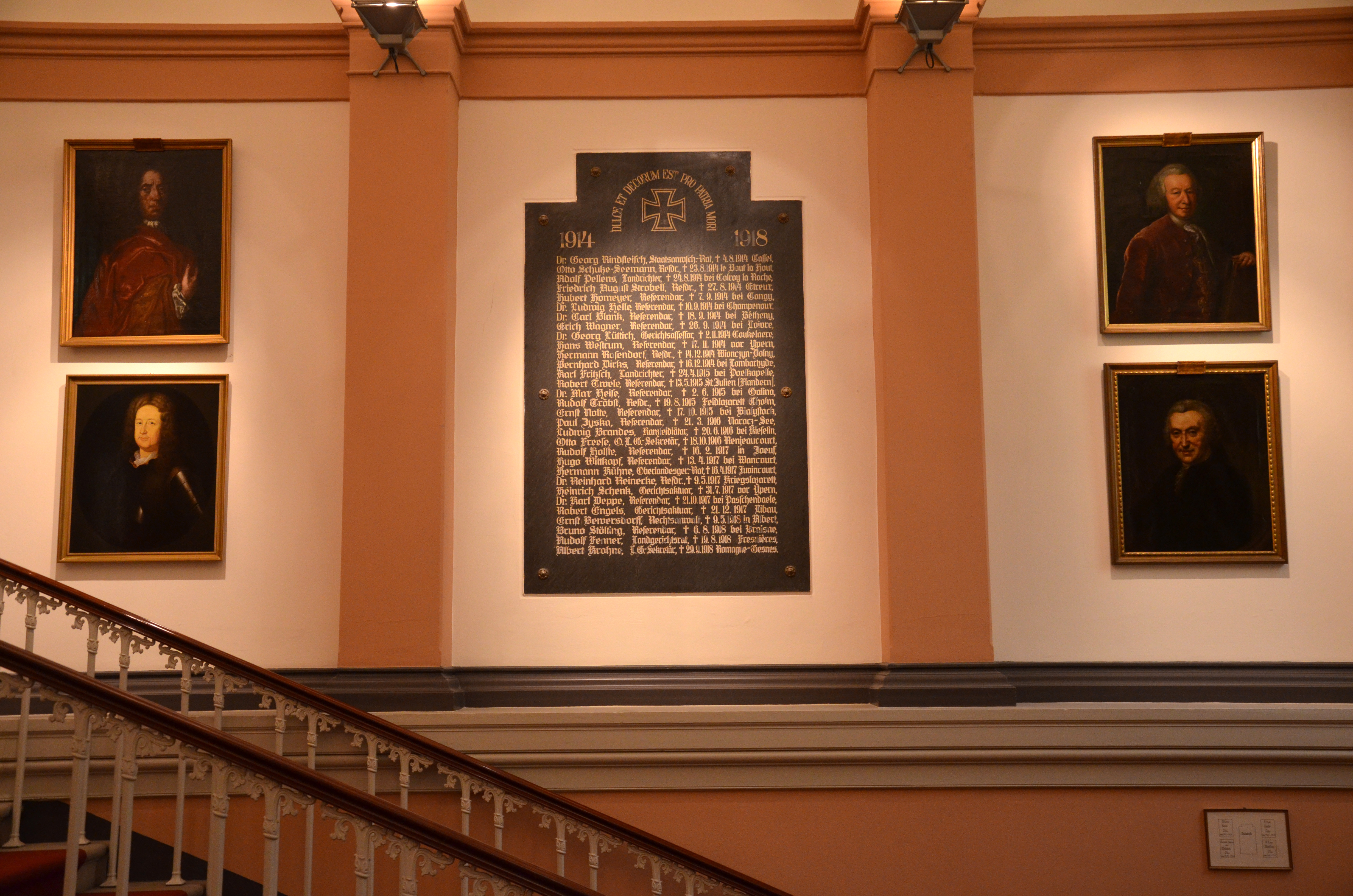 Das sogenannte "Haupttreppenhaus" des ab 1840 erbauten Gebäudes des Oberlandesgerichtes Celle ist zugleich der Aufgang zu einer musealen Kunstsammlung zur Geschichte der Institution des Rechts. So finden sich auf der Westseite des Treppenaufganges, wie hier zu sehen, vier kurz kommentierte Ölgemälde mit ehemaligen Präsidenten des Gerichts: Links oben Weipart Ludwig von Fabrice, darunter Johann Rudolph von Wrisberg, rechts oben Albrecht Friedrich von Lenthe, darunter Detlev Alexander von Wenckstern. Zwischen den vier Gemälden ist eine Gedenktafel für die Gefallenen des Ersten Weltkrieges installiert mit den Namen der mit dem Gericht verbundenen betroffenen Mitarbeiter ...